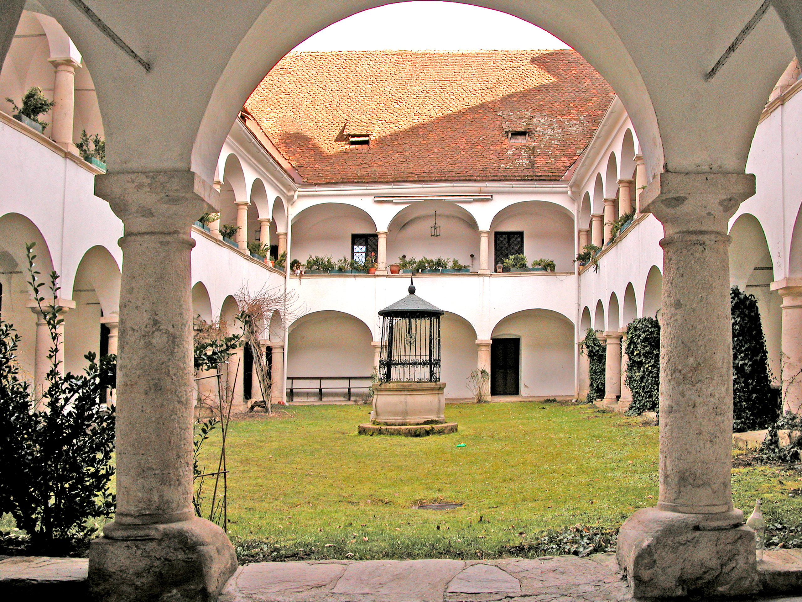 Sankt Nikolai im Sausal Schloss Waldschach ObjektID: 36701